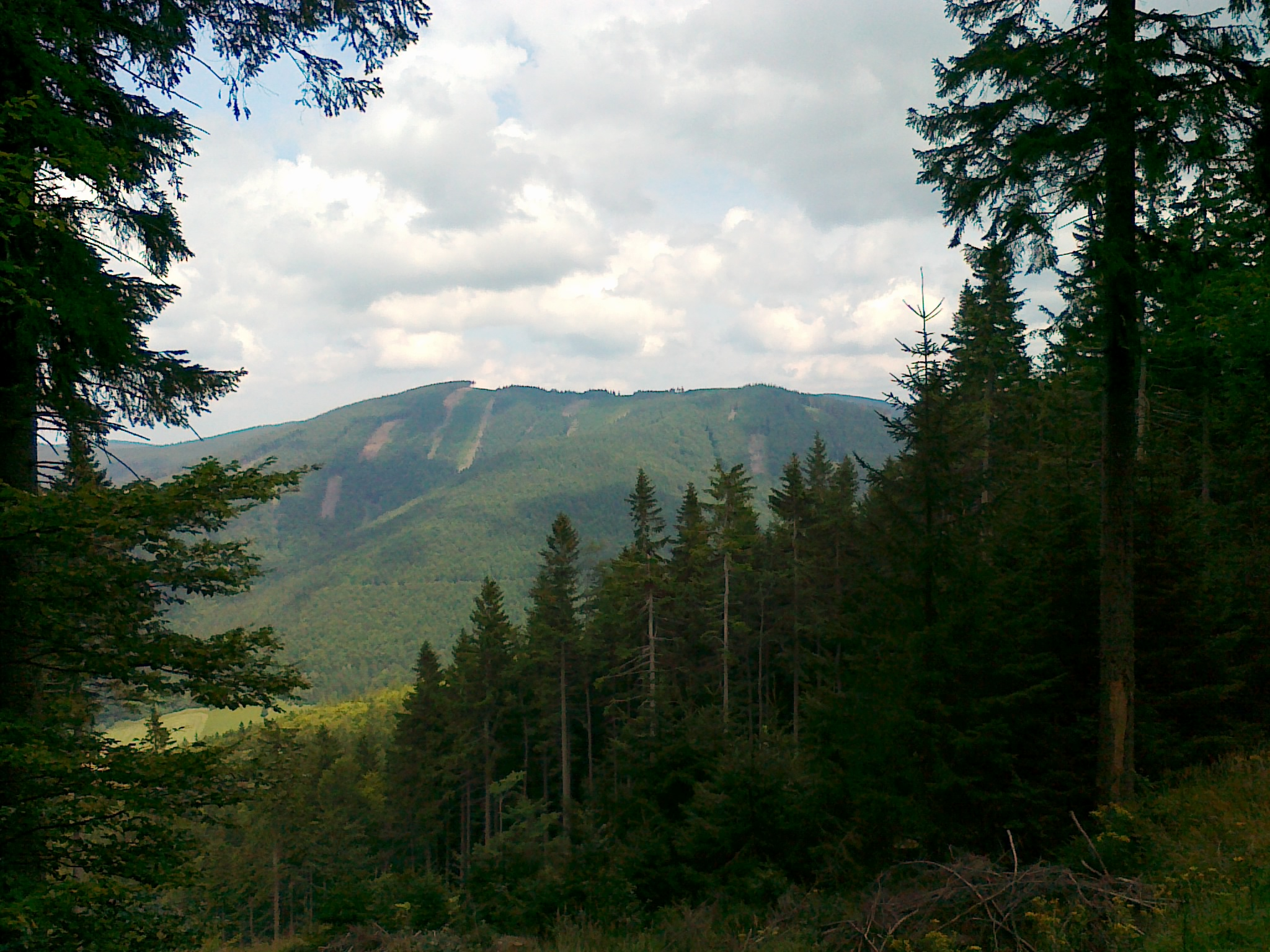 Widok ze szlaku rowerowego nr 6154 na górę Lýsy vrch